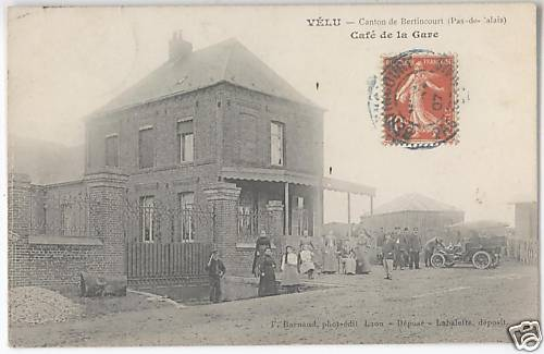 La gare en 1900